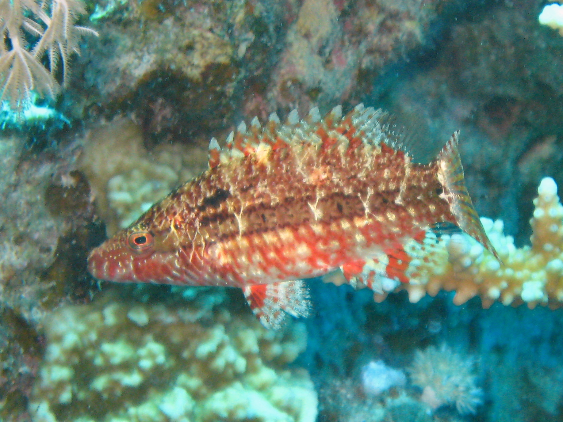 Pteragogus cf. cryptus près de Safaga en mer Rouge.